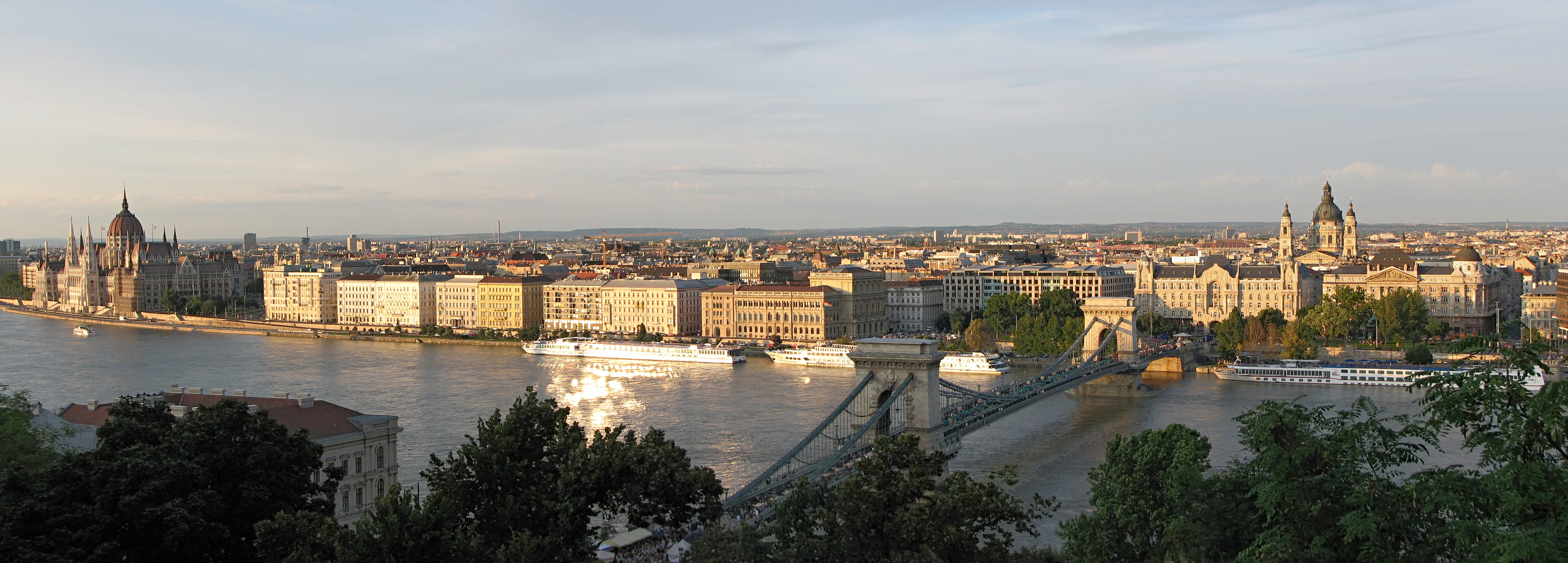 Panorámica de la parte de Pest de la ciudad de Budapest con el río Danubio en primer plano.